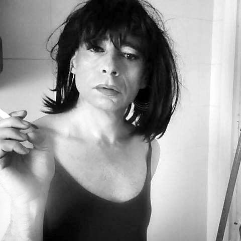 El fuerte rechazo social hacia el travestismo nos provoca autorepresión y culpa. La fotografía como arte nos puede servir para normalizar lo que es real.